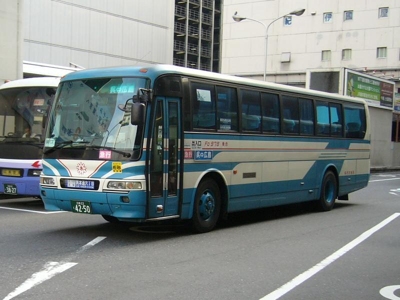 登録番号 広島22く42-50 呉市交通局所属 クレアライン号用 三菱ふそう・エアロバス KL-MS86MP 2006年3月13日 広島バスセンター駅前にて撮影